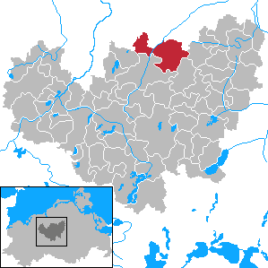 Wardow in Mecklenburg-Vorpommern - District Güstrow